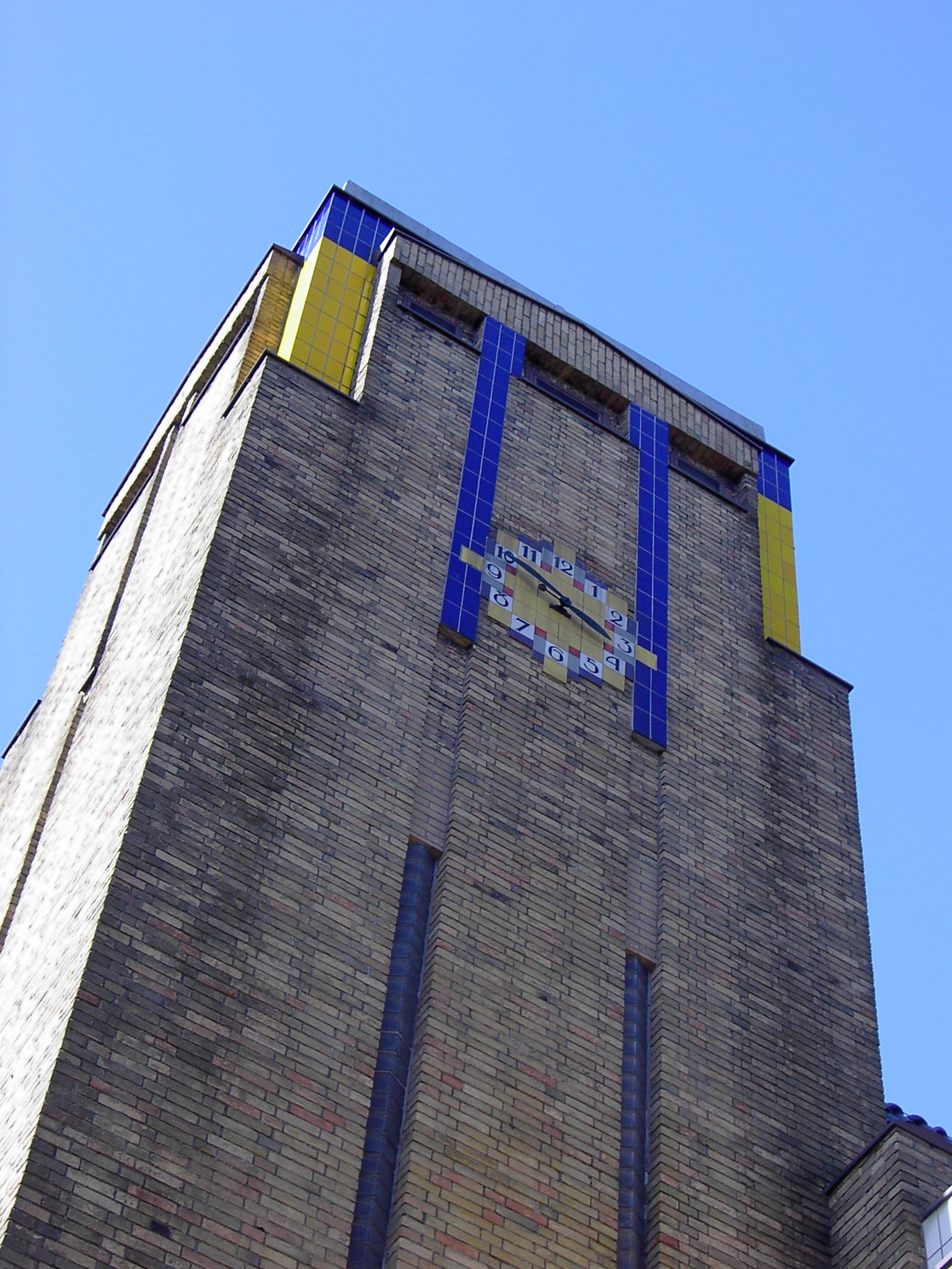 Marechaussekazerne Meppelerstraatweg